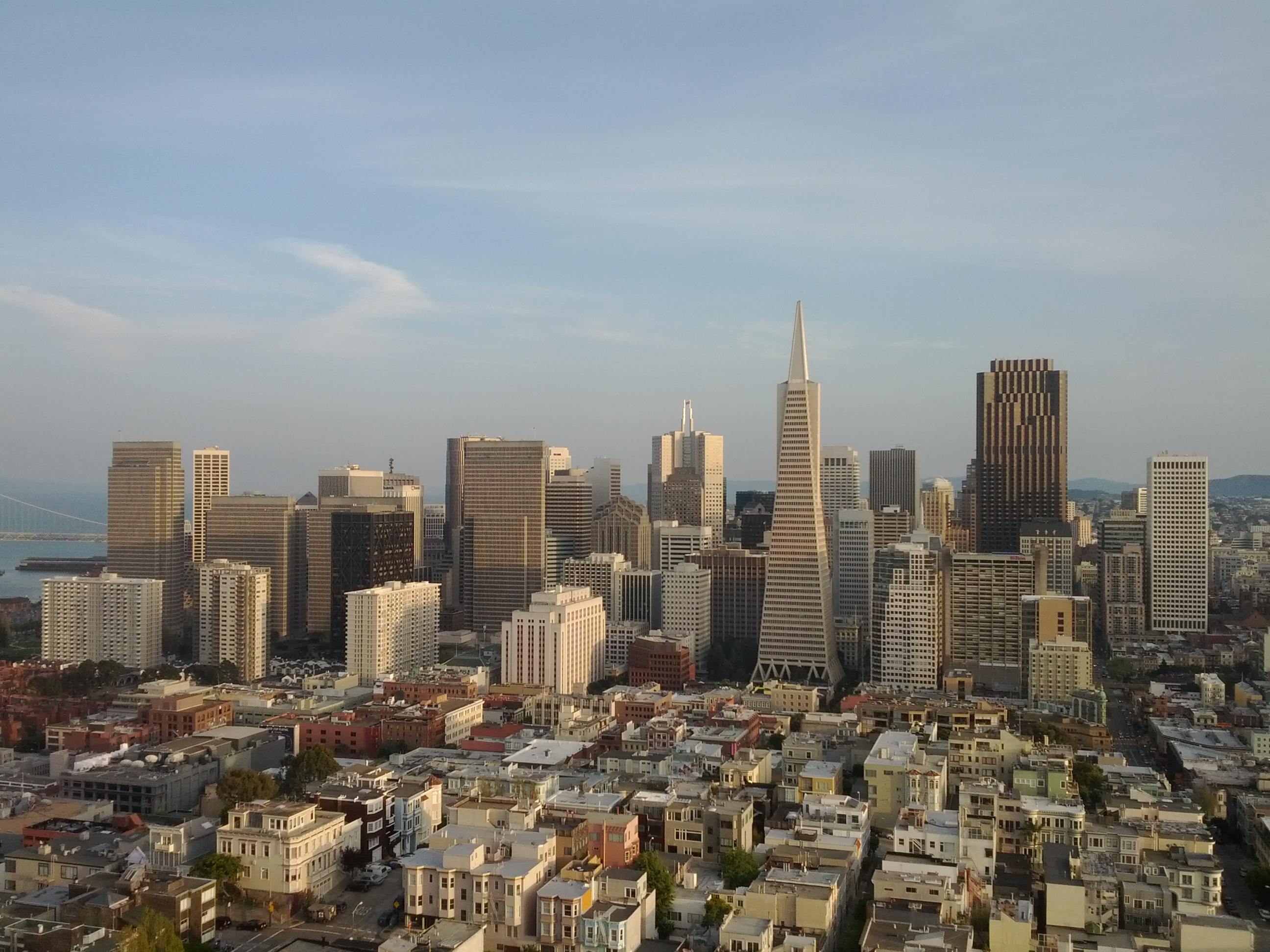 സാൻ ഫ്രാൻസിസ്കോ നഗരം